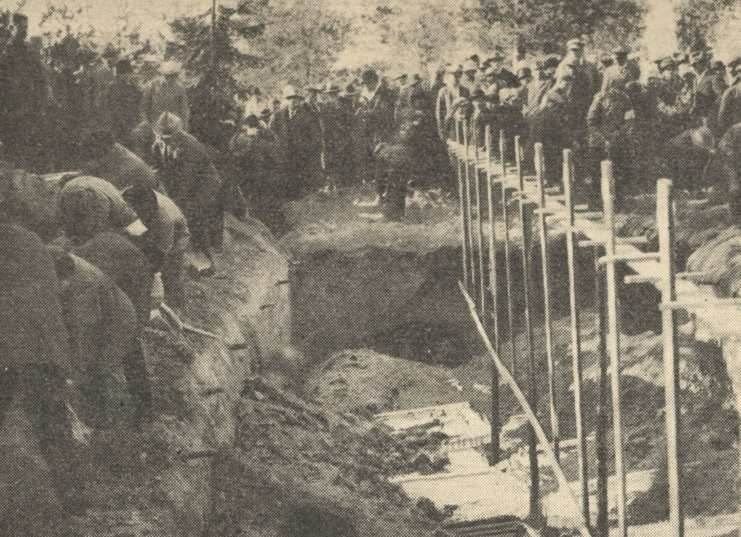 Description